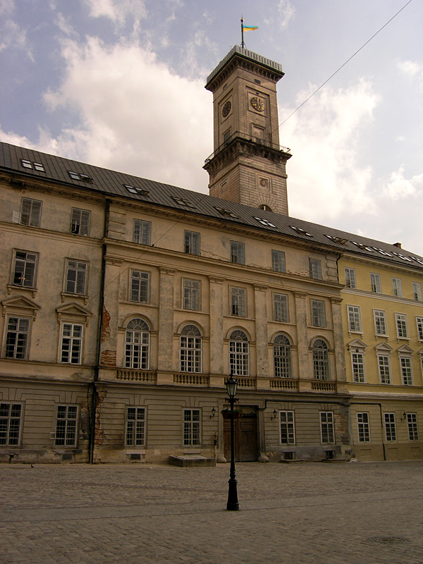 Market square, Lviv